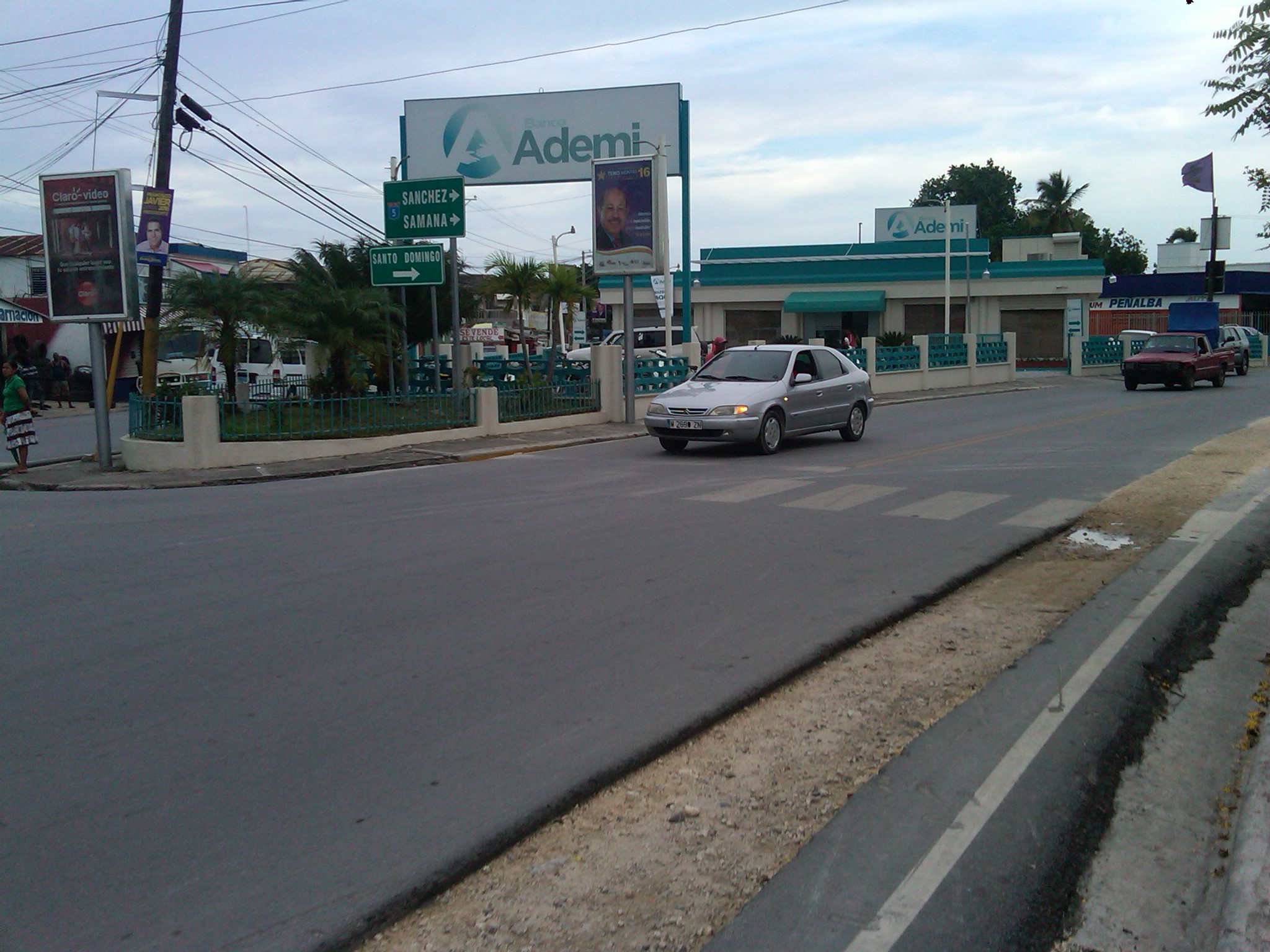 Una calle de Nagua